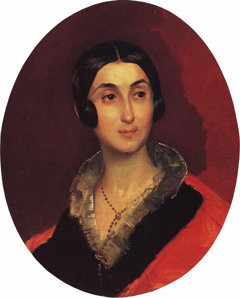 Портрет Е. И. Тон, жены художника К. А. Тона. 1837-1840